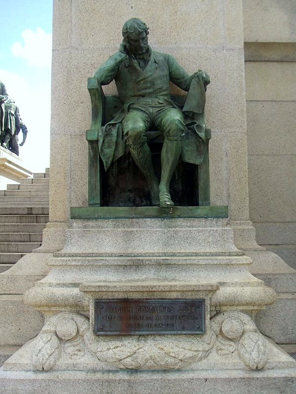 Estátua de Joaquim Gonçalves Ledo, no Monumento à Independência, Ipiranga, São Paulo, Brasil.